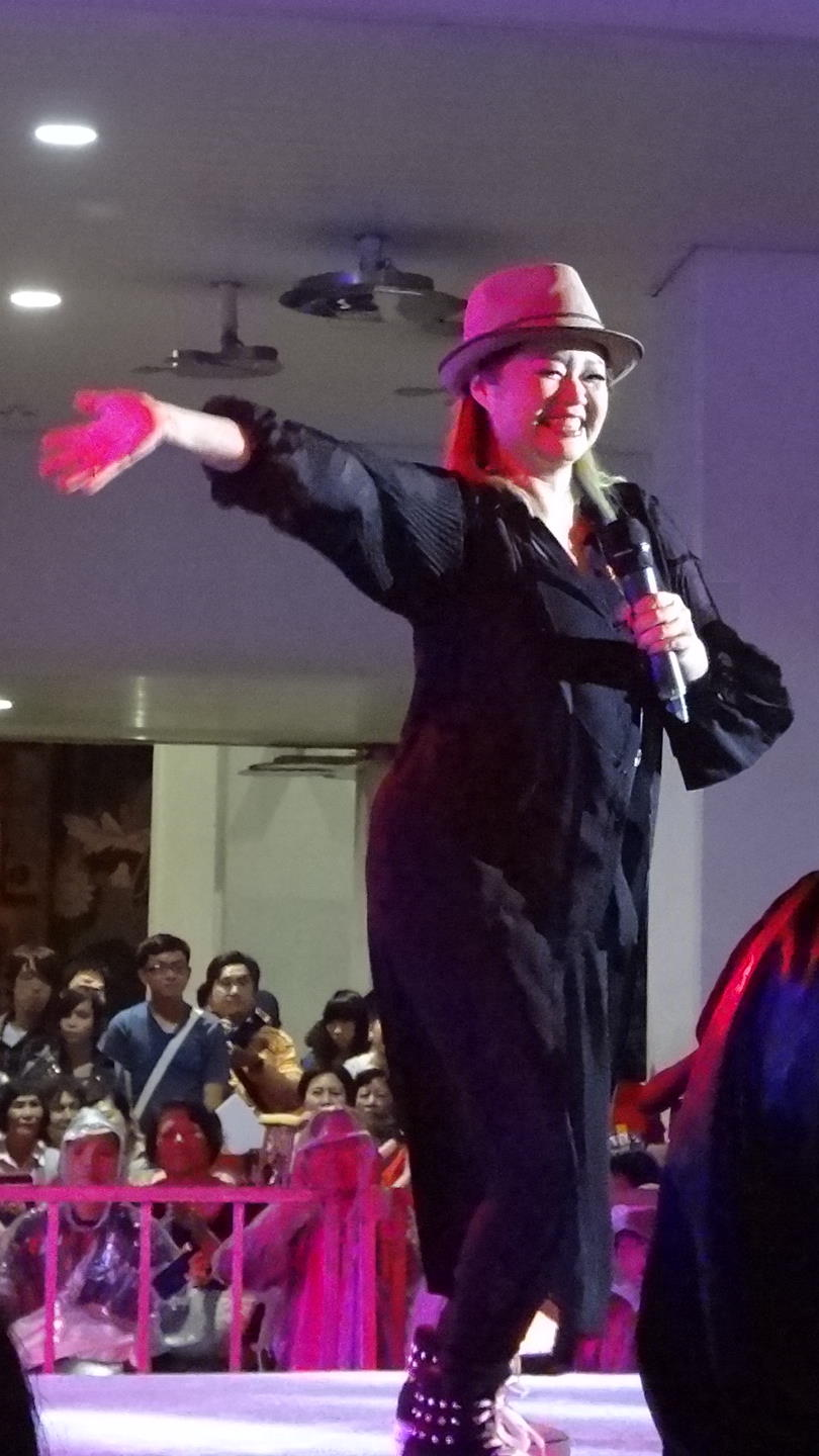 金智娟出席臺北捷運劍南路站站外廣場「一路唱快‧捷運好行」音樂會